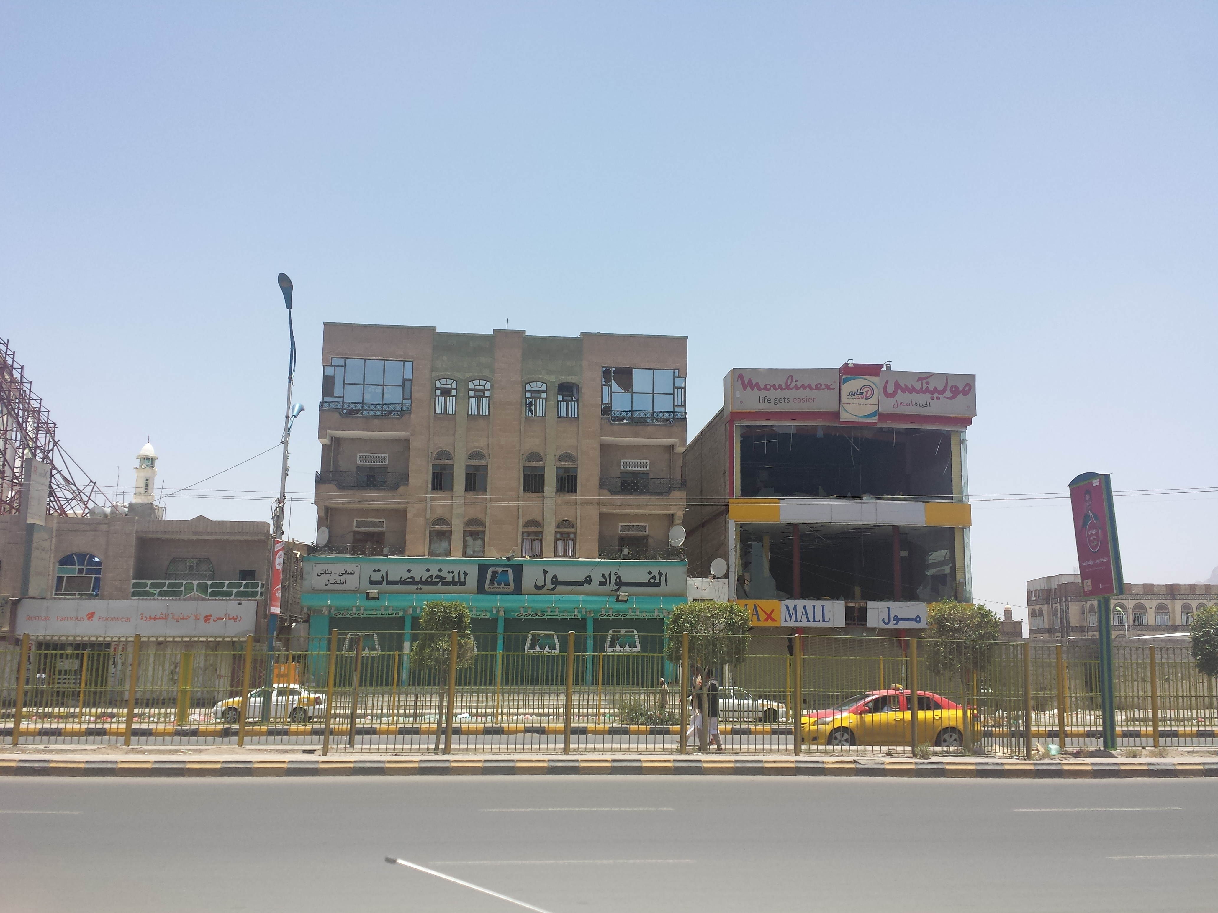 دمار واسع في الأحياء السكنية المحيطة بجبل فج عطان الذي تعرض لضربة جوية من طائرات حربية من عملية عاصفة الحزم.